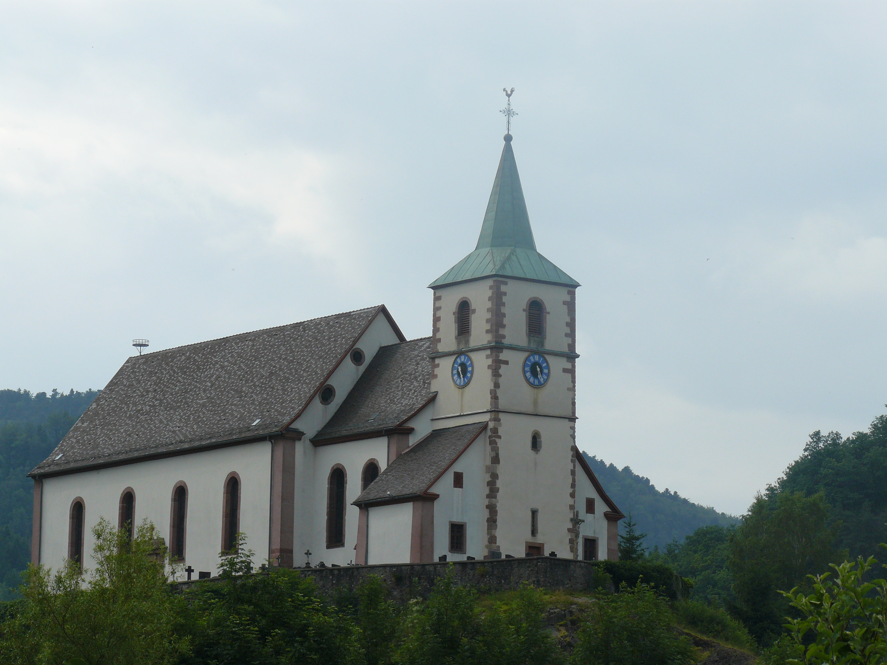 Eglise Saint-Nicolas